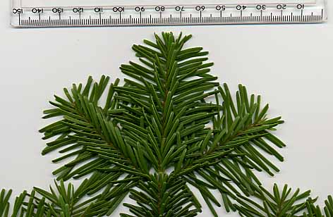 Abies amabilis foliage